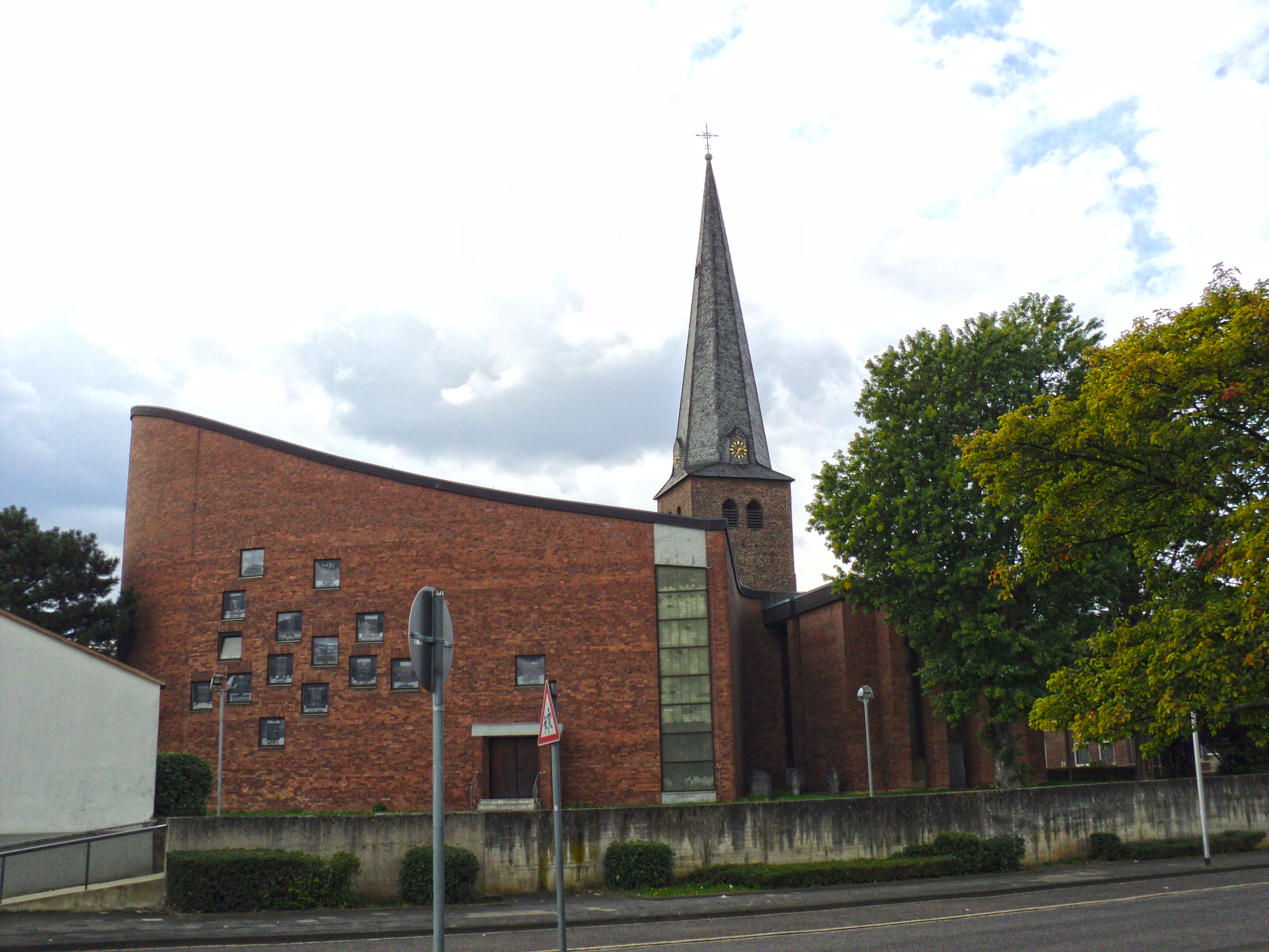 Pfarrkirche St. Peter in Düren-Merken (Nordrhein-Westfalen), Ansicht von Osten.